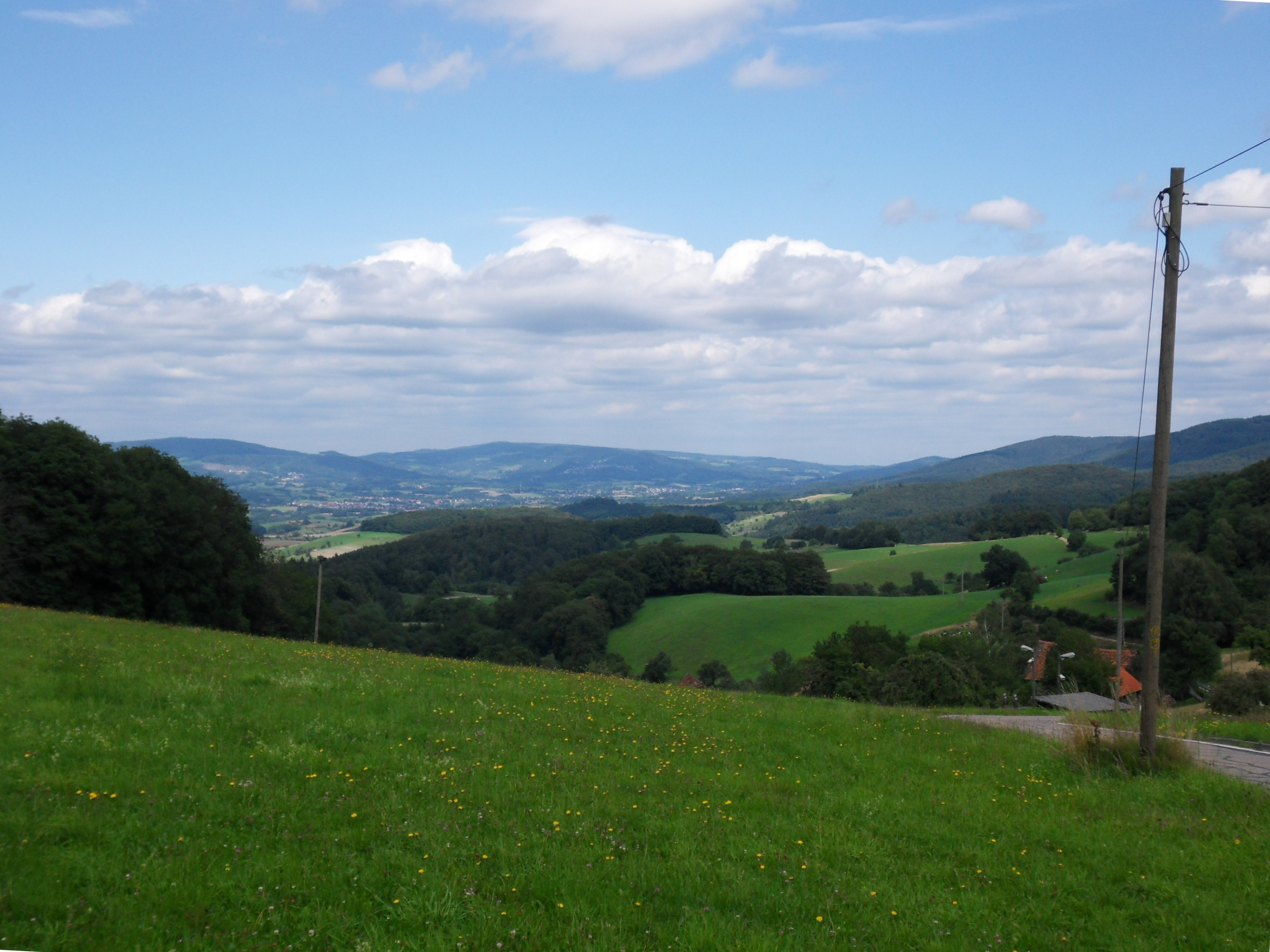 Blick von der Sattelhöhe der Kreisstraße nach Norden über Schnorrenbach in das Weschnitztal